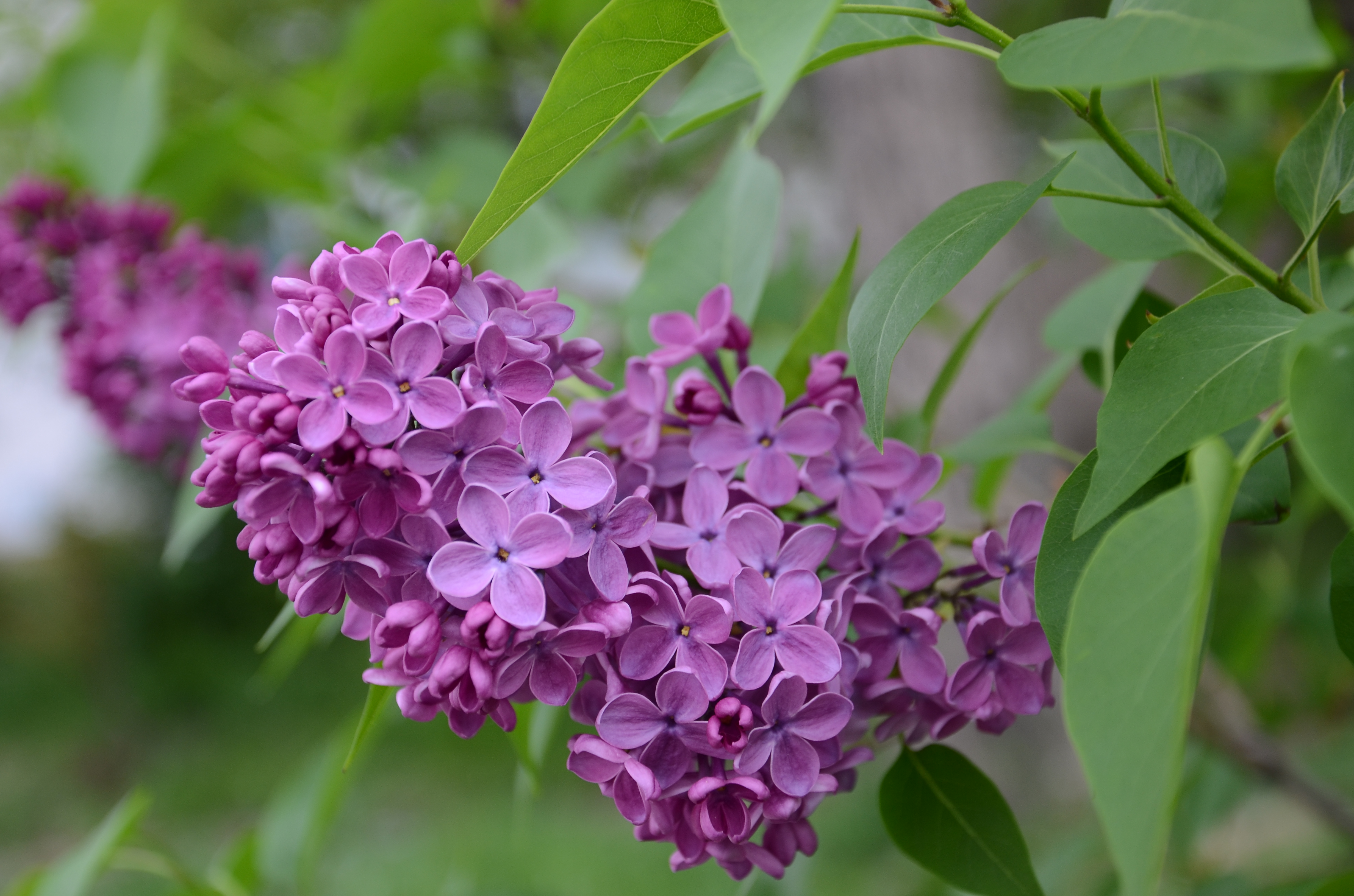 Донецк.